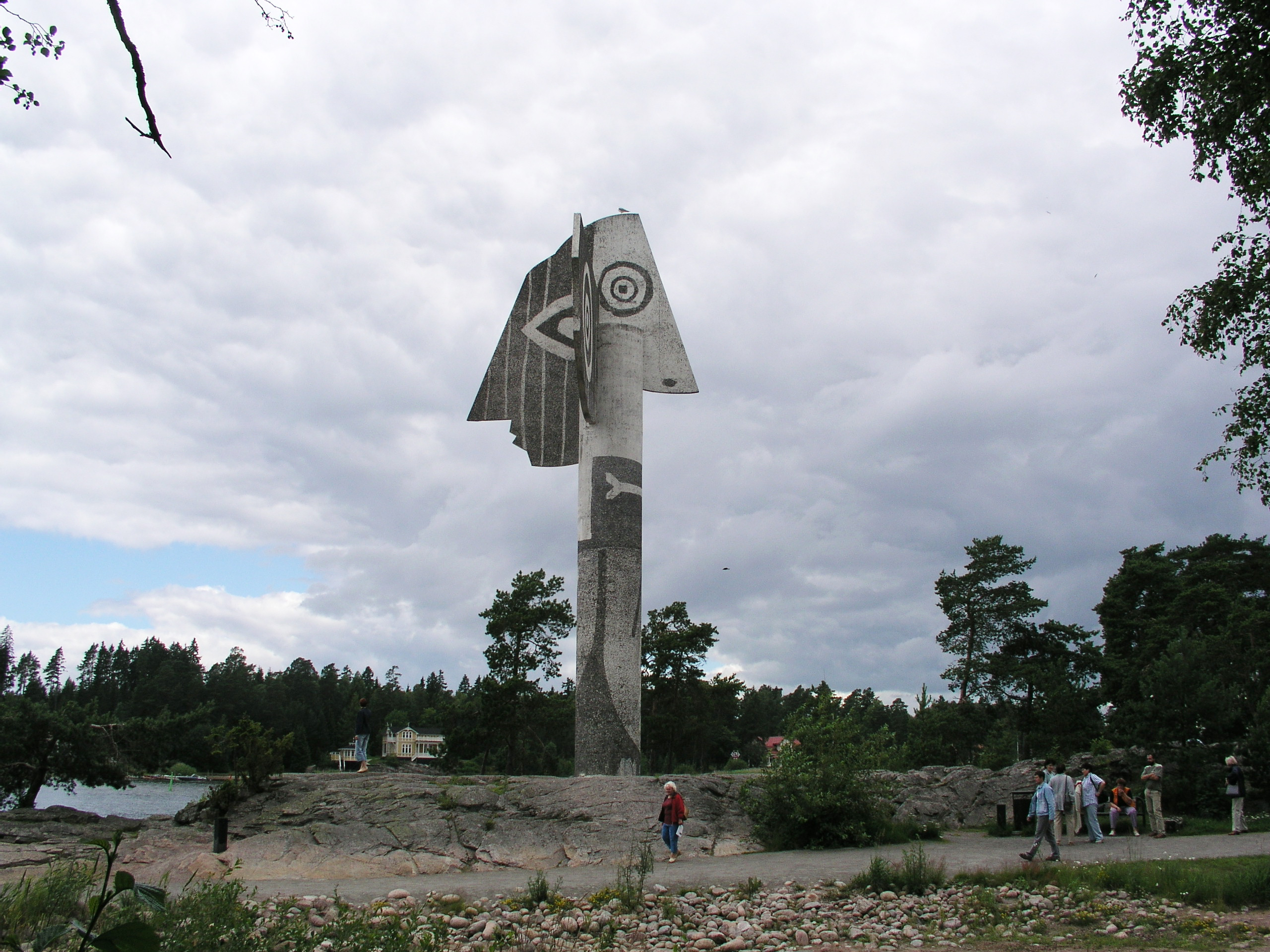 Picasso statue on Strandudden, Kristinehamn, Sweden